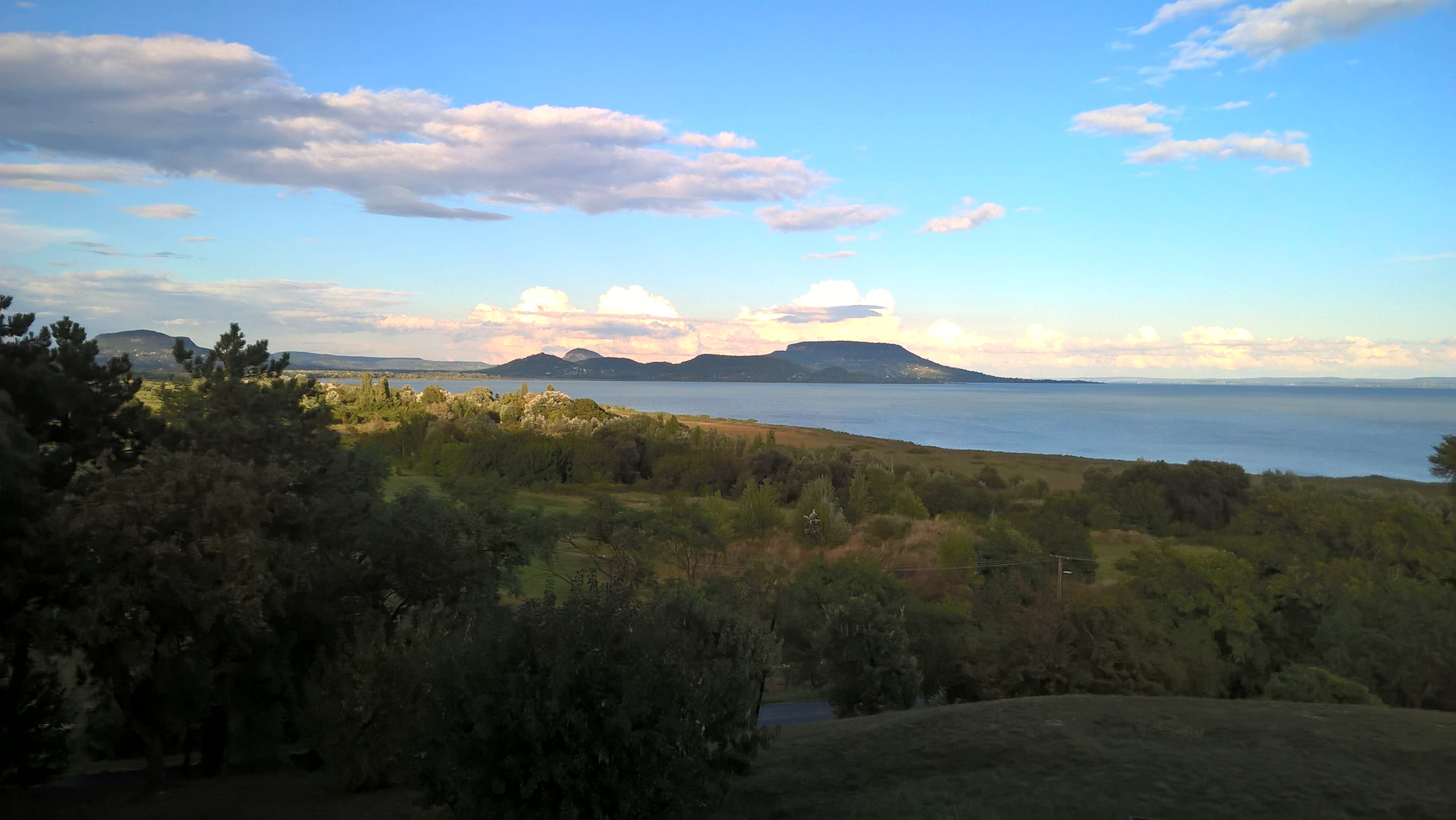 Szépkilátó, Balatongyörök. A Tapolcai medence tanúhegyei : a Badacsony, a Szent György-hegy, a Csobánc, a Gulács, a Tóti-hegy, a Haláp